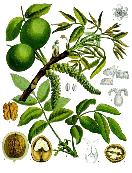 Echte Walnuss. A Zweig mit männlichen und weiblichen Blüthen, natürl. Grösse; B Zweig mit weiblichen Blüthen, desgl.; C Früchte, desgl.; 1 Theil des männlichen Kätzchens mit 4 Blüthen, vergrössert; 2 männliche Blüthe von oben gesehen, desgl.; 3 weibliche Blüthe, desgl.; 4 dieselbe längs durchschnitten, desgl.; 5 Staubgefässe, desgl.; 6 Steinfrucht mit halbirter äusserer Hülle, natürl. Grösse; 7, 8 Steinfrucht im Längs- und Querschnitt, desgl.; 9 Same, desgl.